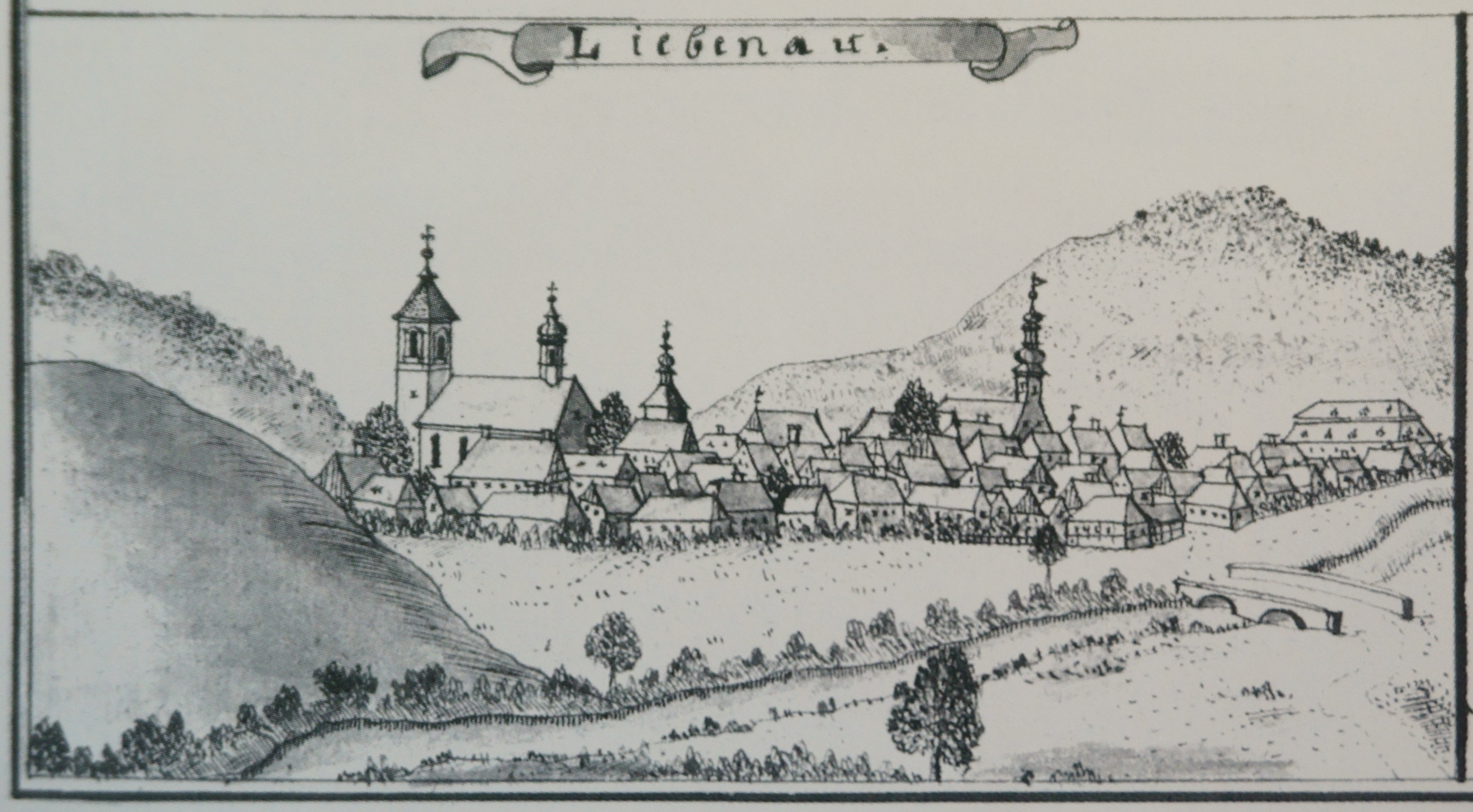 Topographie Böhmen und Mähren, Tafel 22. Původně kresba z roku 1742, dnes konvolut kreseb nezvěstný, pouze z fotografií z roku 1942.